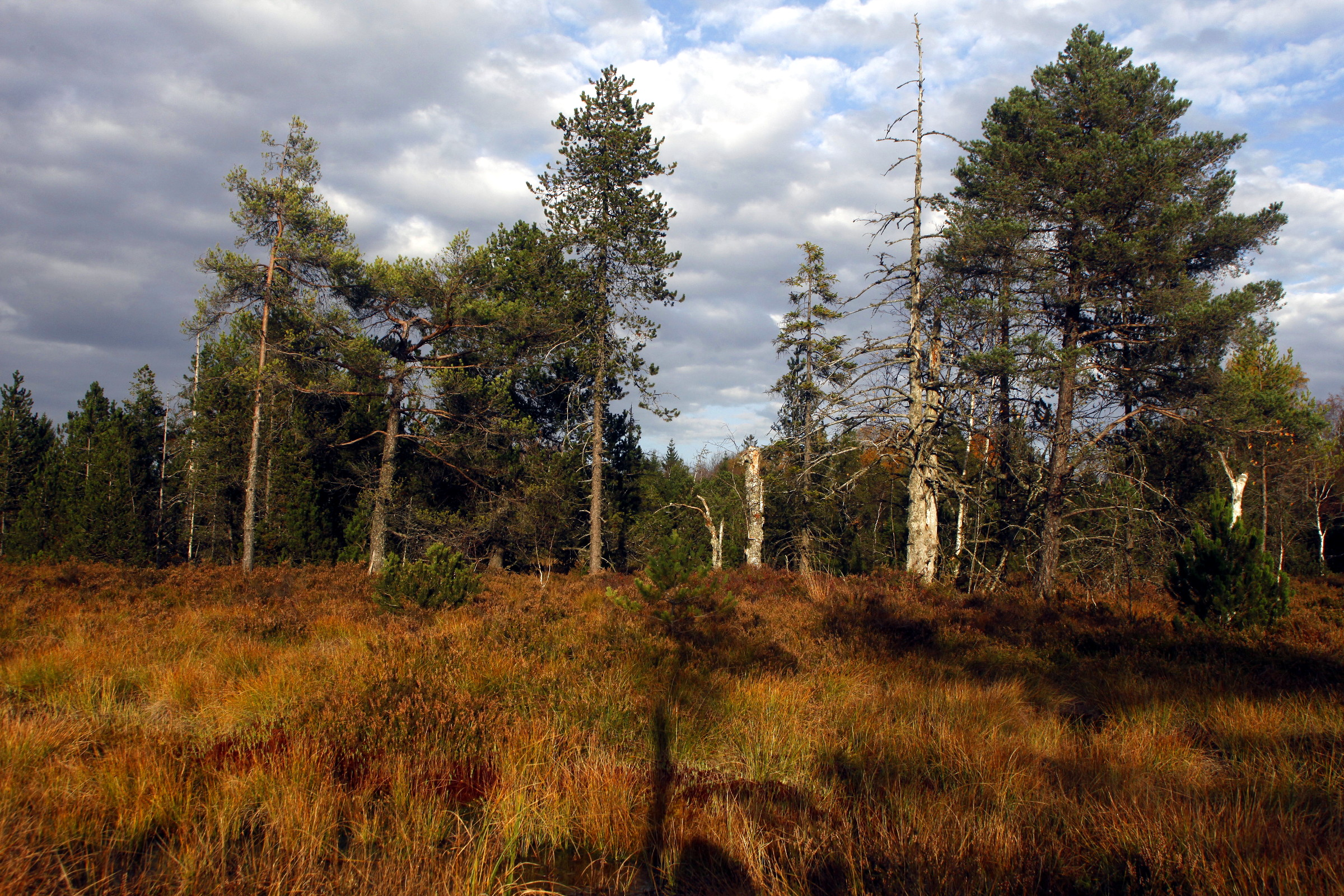 Pins à crochet dans la RNR de la Seigne des Barbouillons